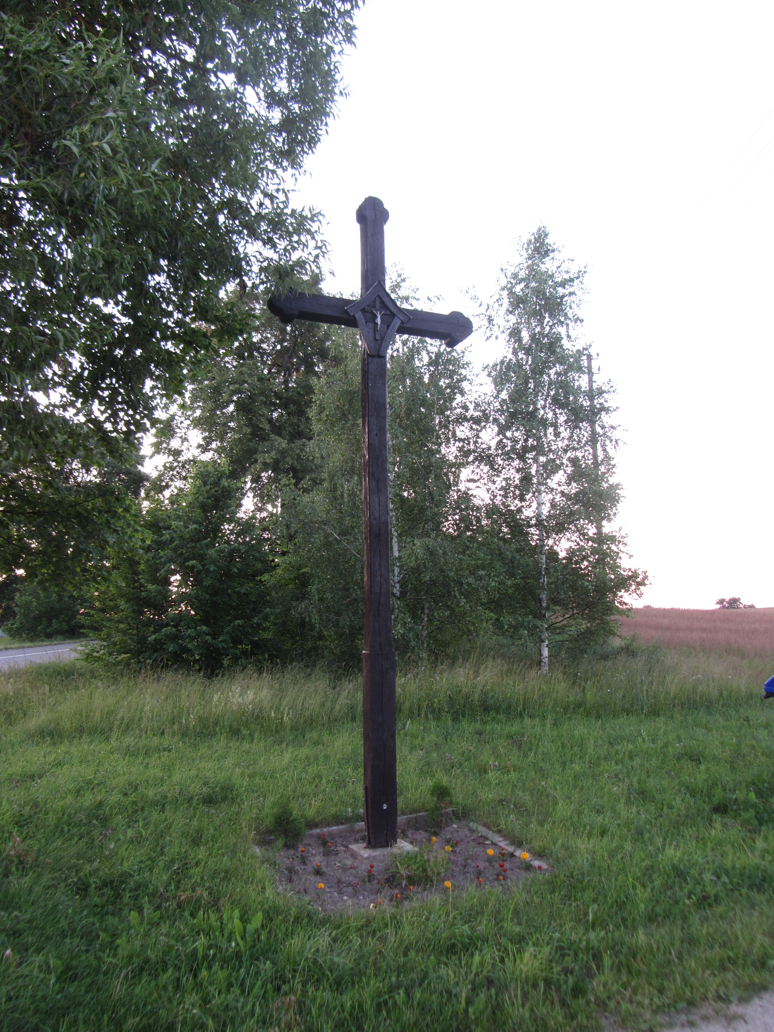 Mikalavas 64484, Lithuania